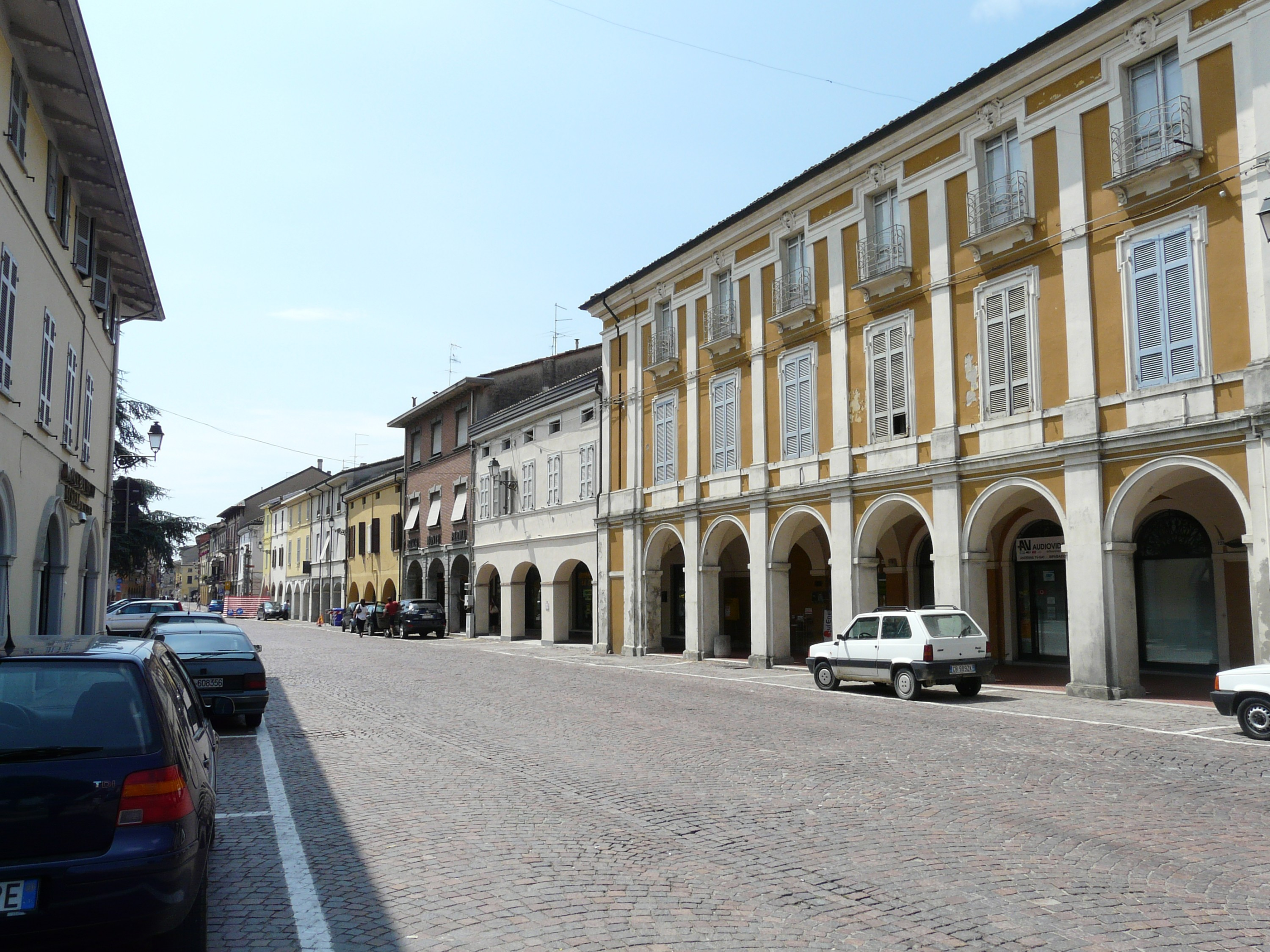 Centro storico di San Secondo Parmense, Emilia-Romagna, Italia